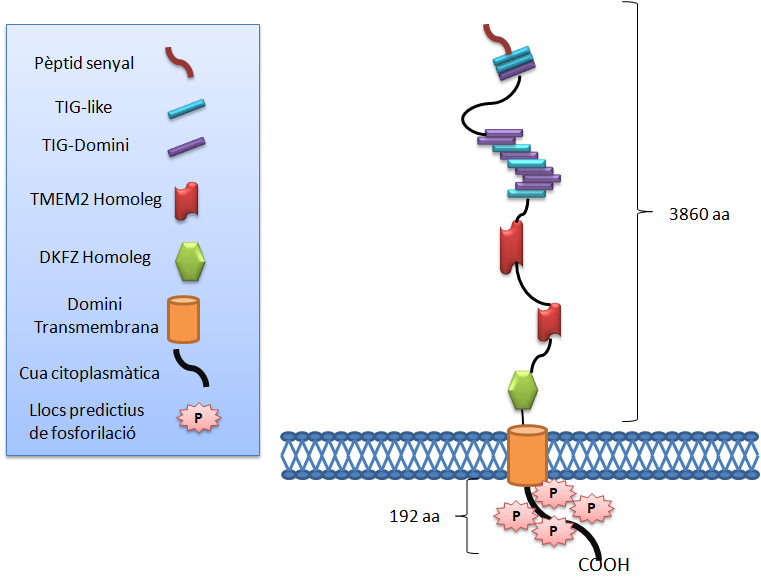 L'anterior representació publicada contenia un error, aquesta és la correcta.